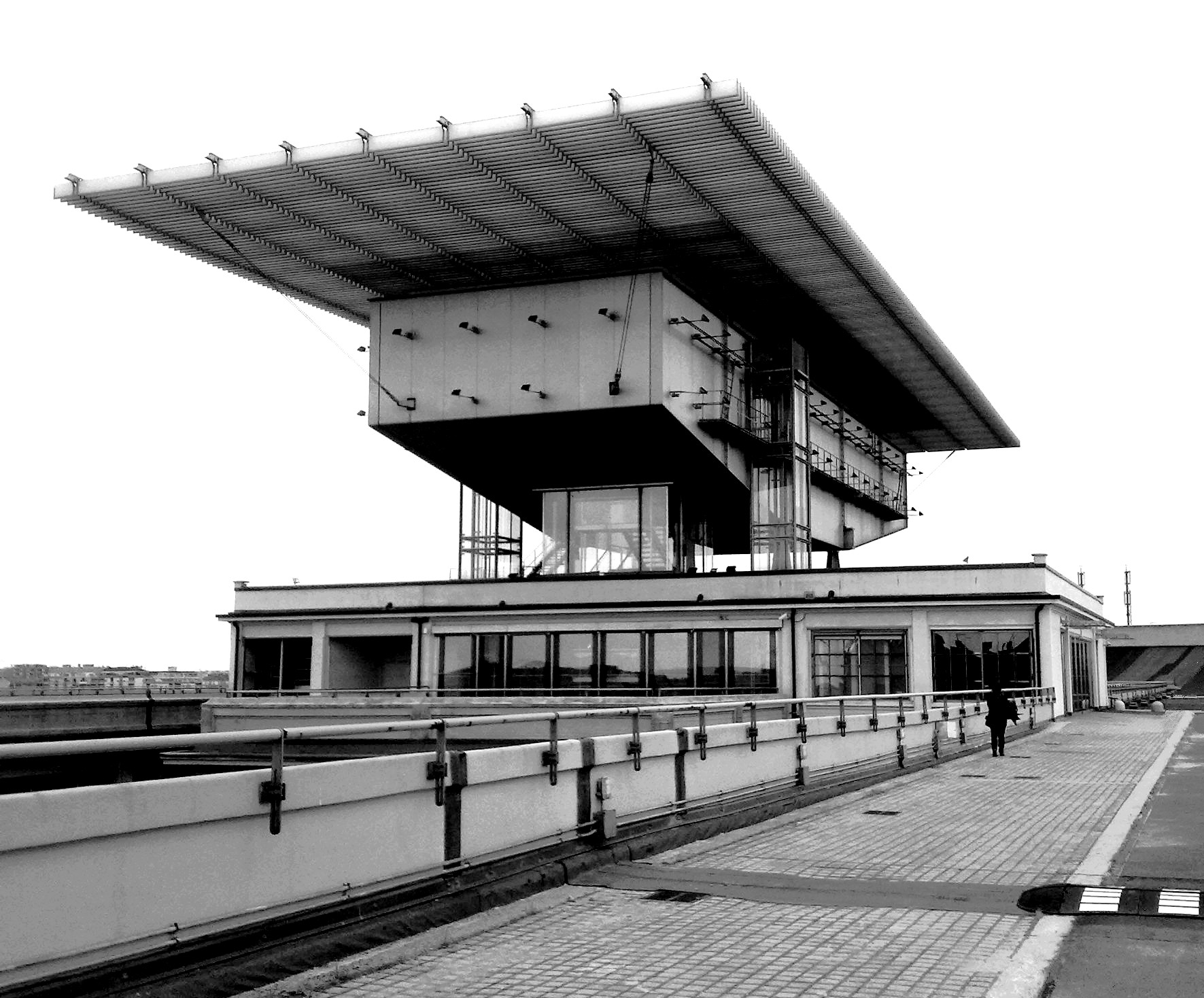 Pinacoteca Giovanni e Marella Agnelli (solo esterni) This is a photo of a monument which is part of cultural heritage of Italy.